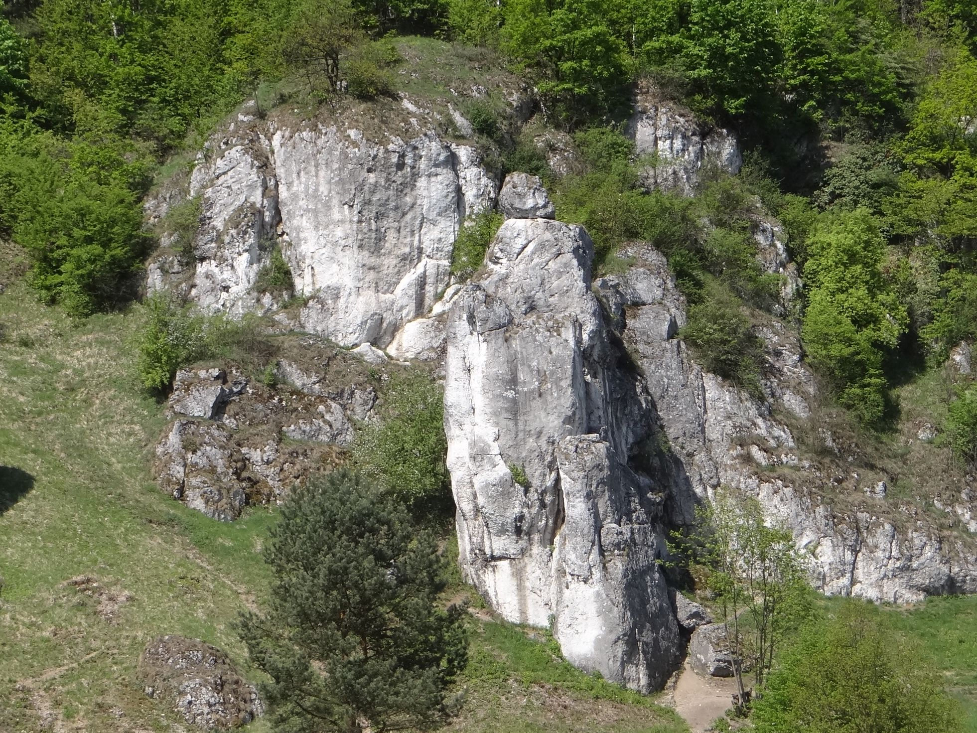 Wysoka Płyta i Turnia z Krokiem w Dolinie Kobylańskiej